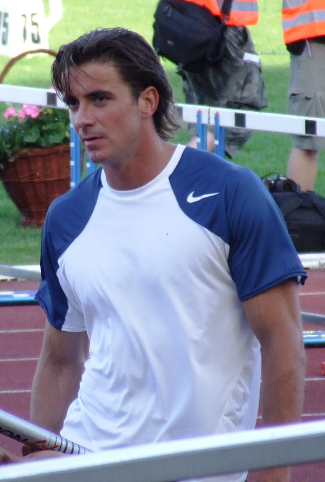 Adam Kolasa, polski skoczek o tyczce, Bydgoszcz Dolcan Cup 2007